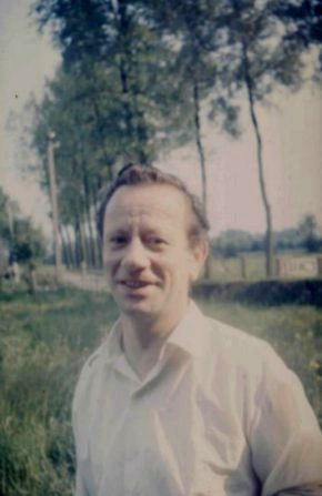 Portret op Drongen-Luchteren circa 1968